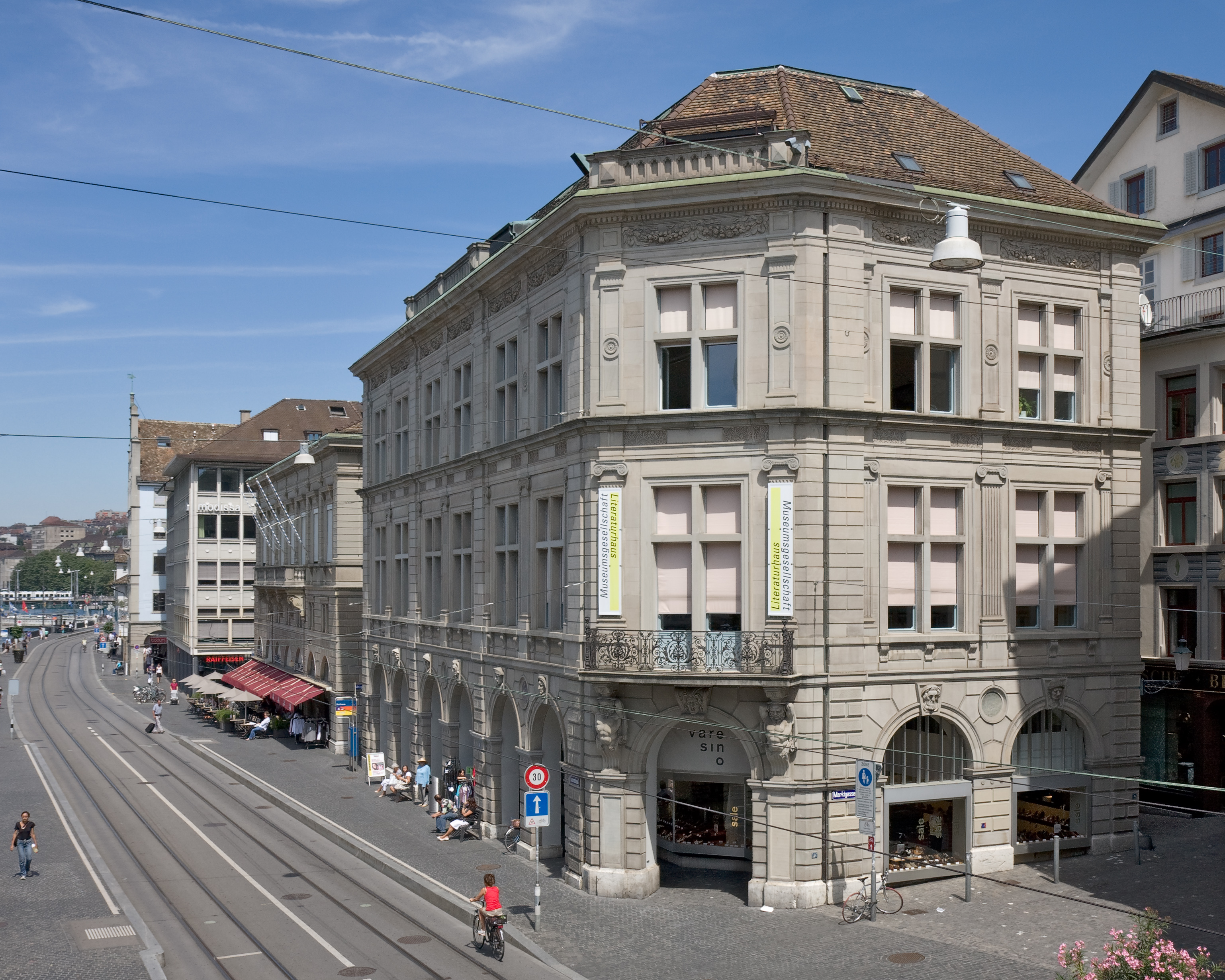 Ferdinand Stadlers Haus der Museumsgesellschaft am Limmatquai 62, erbaut 1866/67